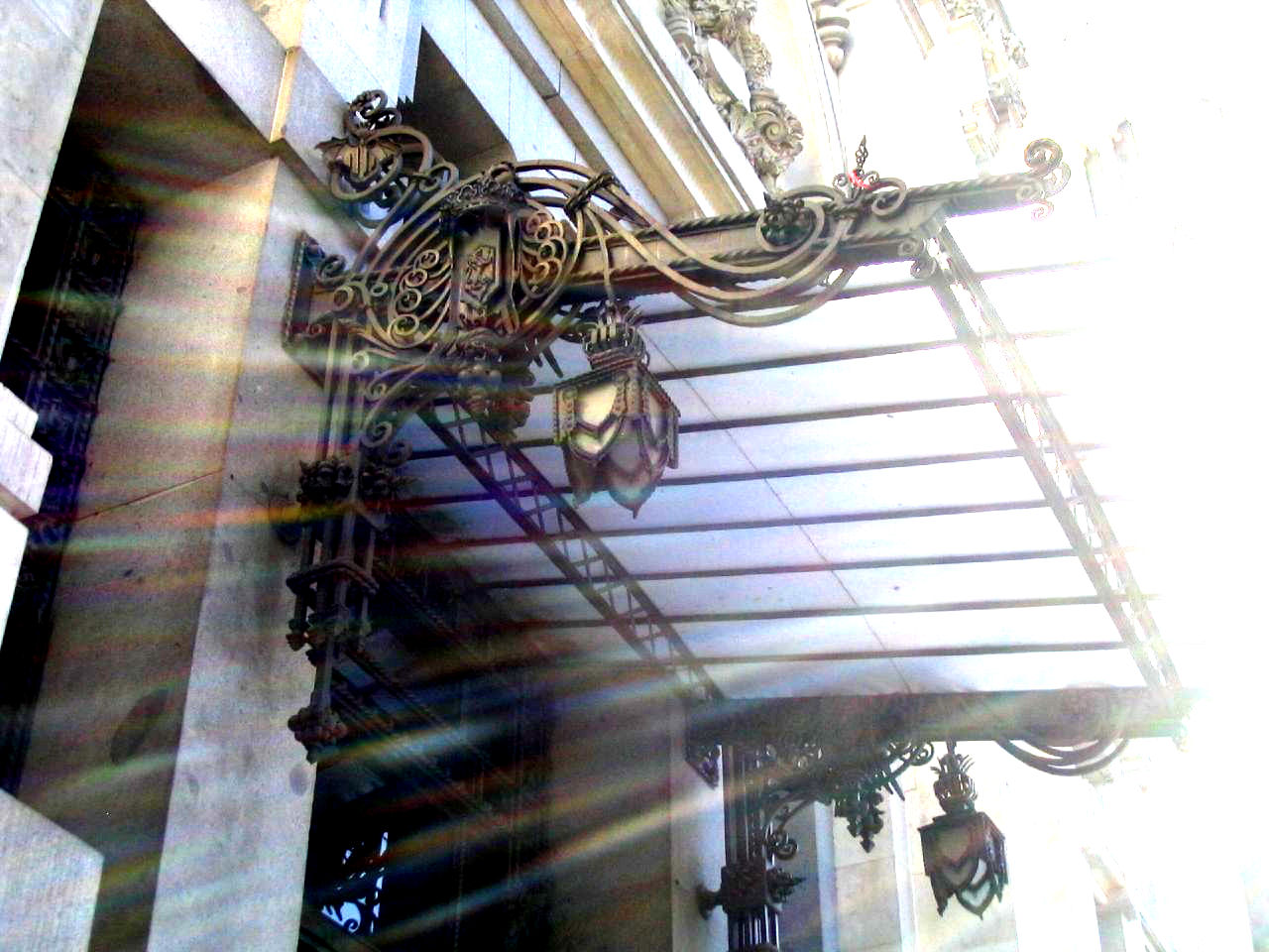 me gusta el trabajo de forja que se puede apreciar en la fachada de este edificio.